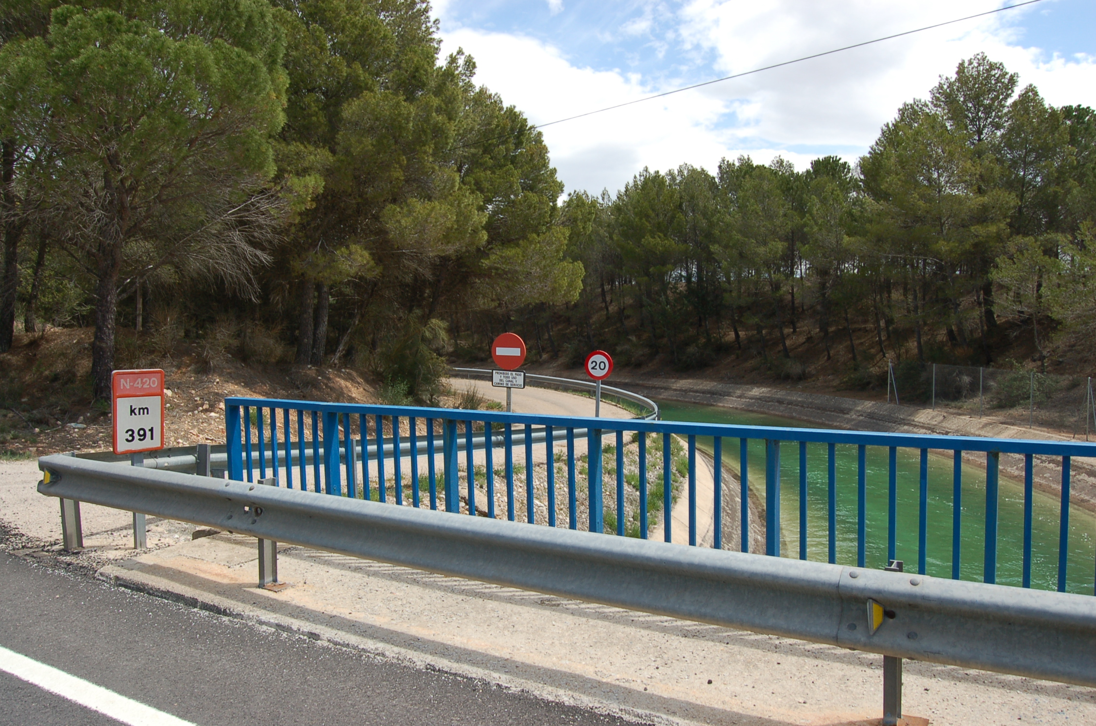 Trasvase Tajo-Segura Belmontejo baixo a estrada N-420 km 391, en Belmontejo